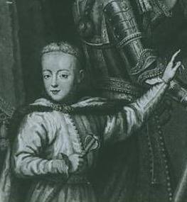 Konstanty Władysław Sobieski, son of John III Sobieski.